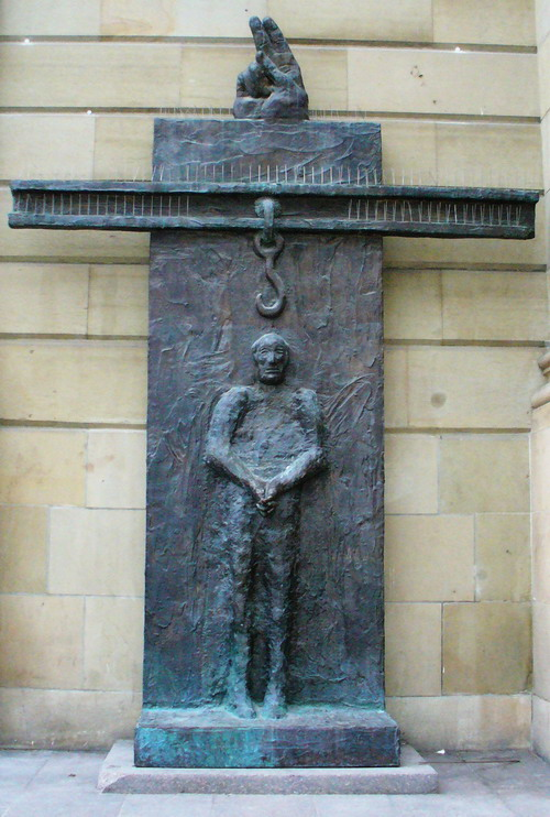 Denkmal für Eugen Bolz in Stuttgart am Königsbau von Alfred Hrdlicka, 15.März 1993 Selbst fotografiert von user:Enslin At 6 Jan 2006 in Stuttgart